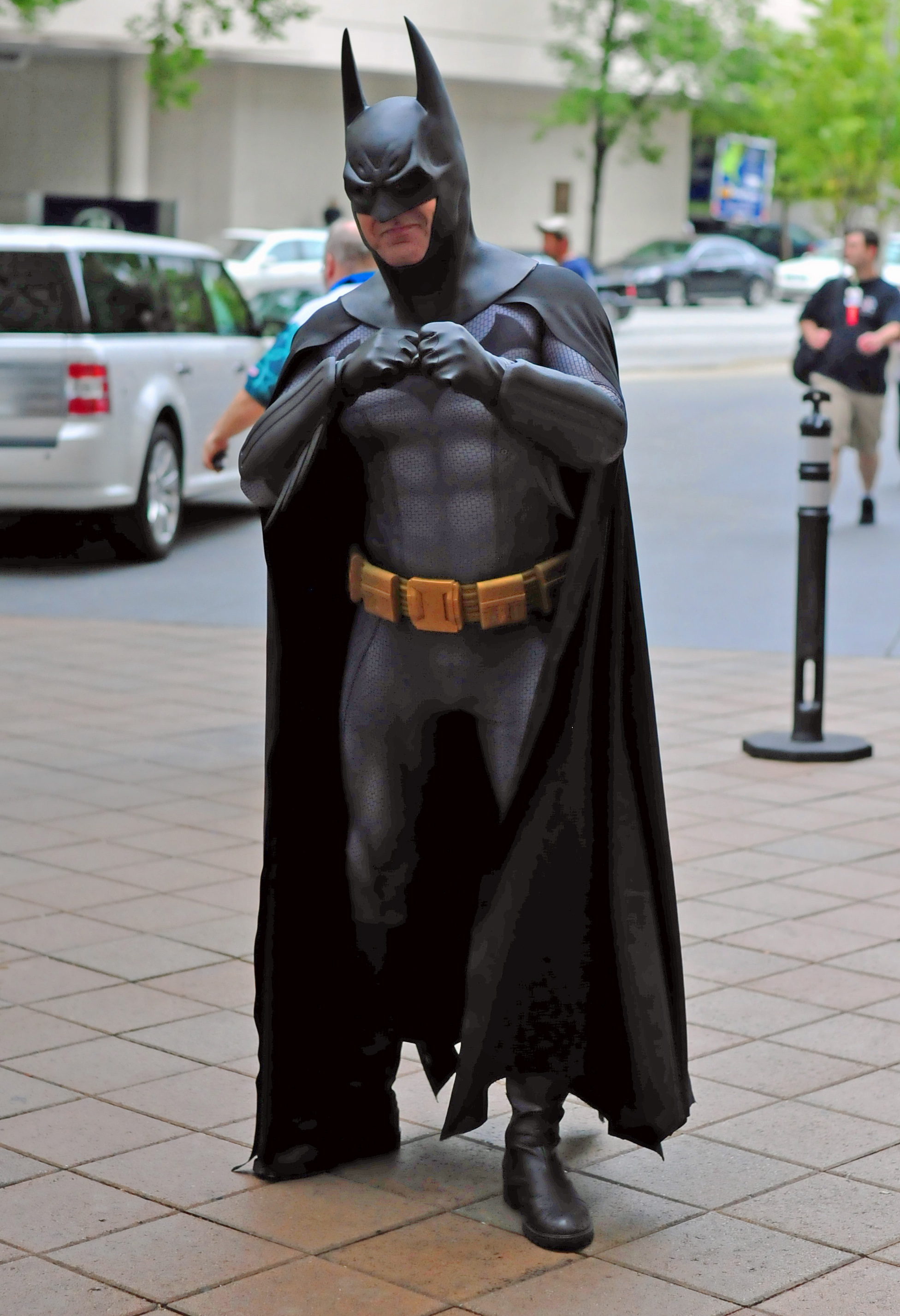 Batman Cosplayer at DragonCon 2012.